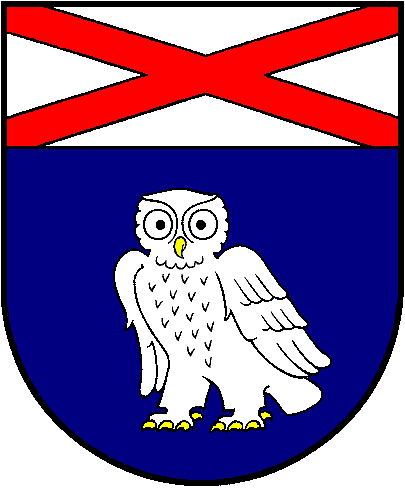 Andrioniškio herbas